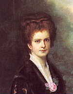 Maria Pia von Savoyen (1847–1911)